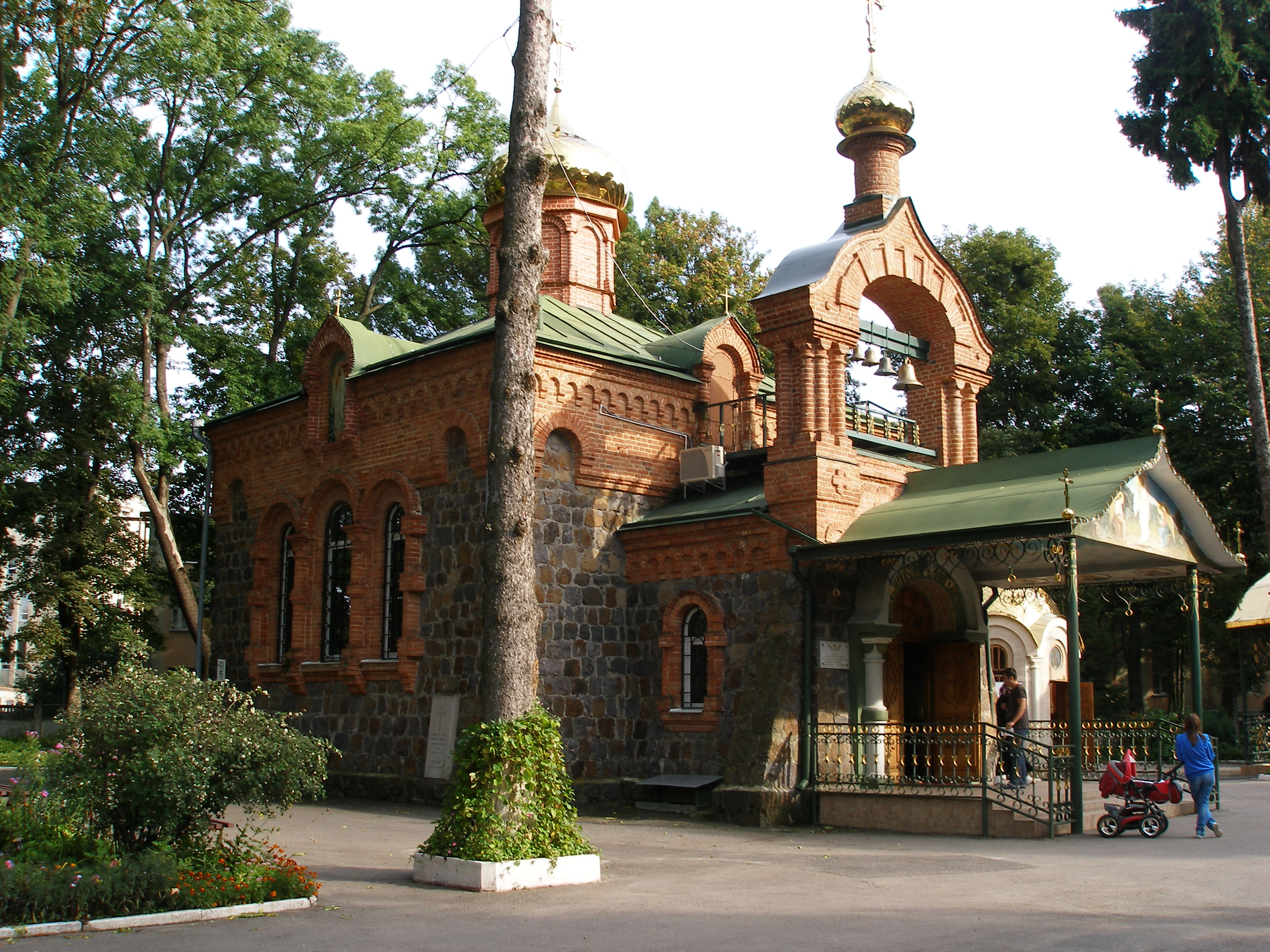 Церква Воскресіння Христова